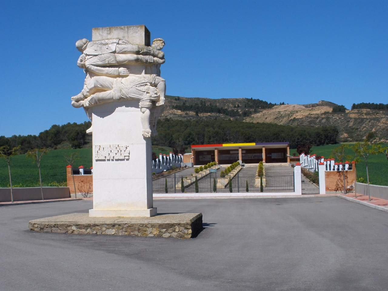 Cementerio Civil 'La Barranca', en Lardero, La Rioja. Acoge los restos de los represaliados del bando franquista en la zona durante la Guerra Civil Española